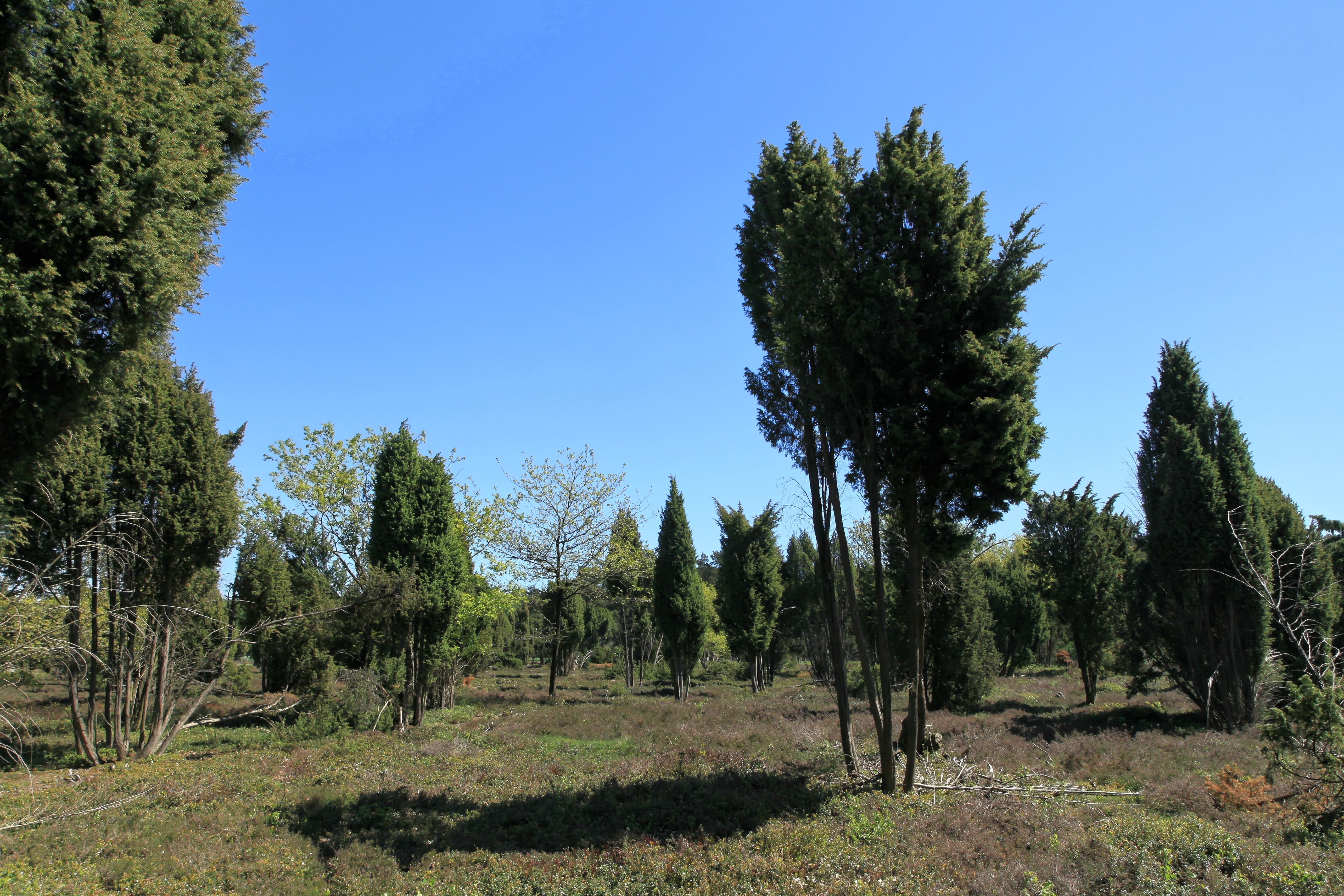 Wacholderhain in Börger